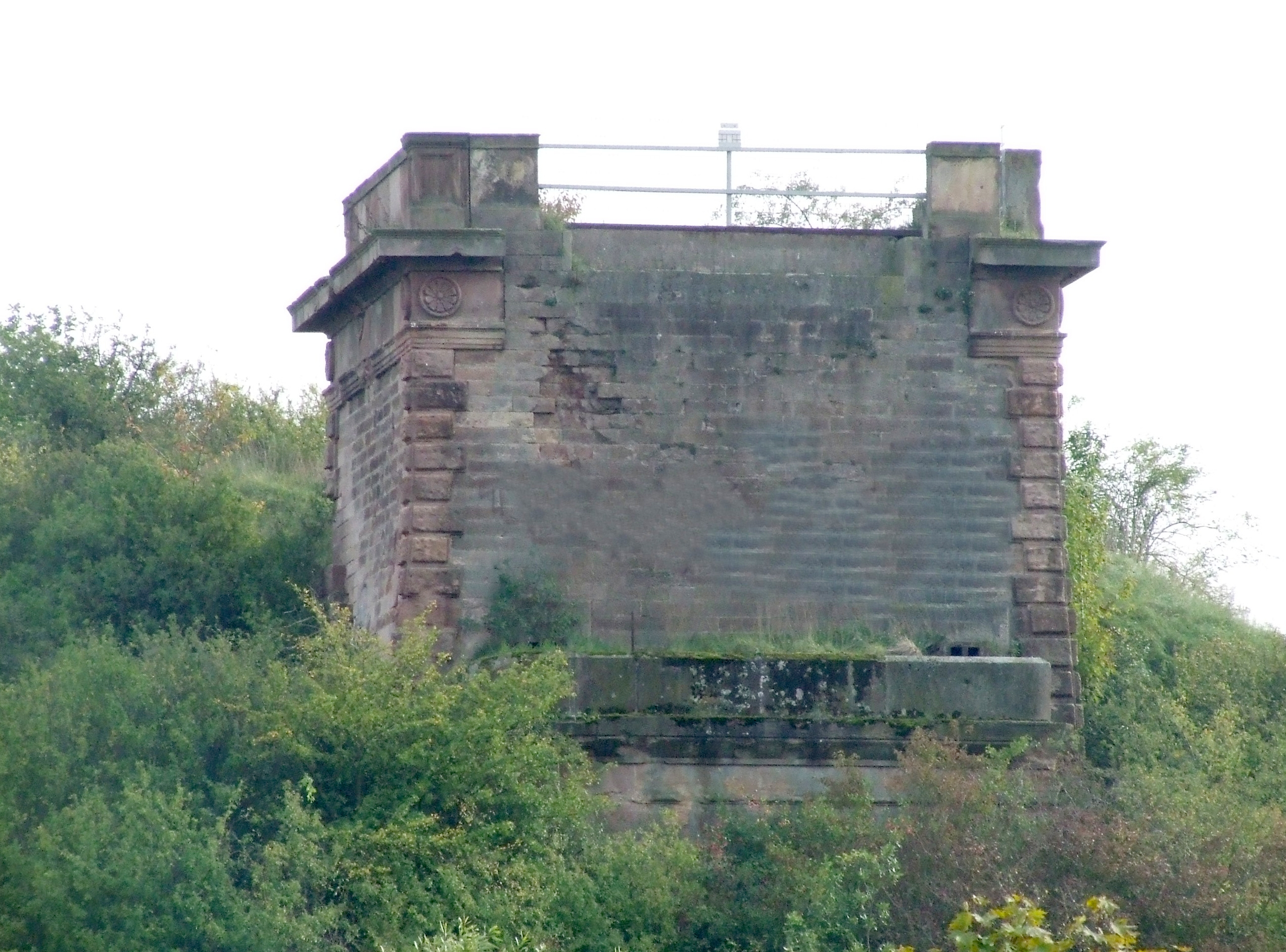 Pfrimmtalviadukt bei Marnheim (bei diesem Bild habe ich die blöden Grafitischmierereien entfernt)